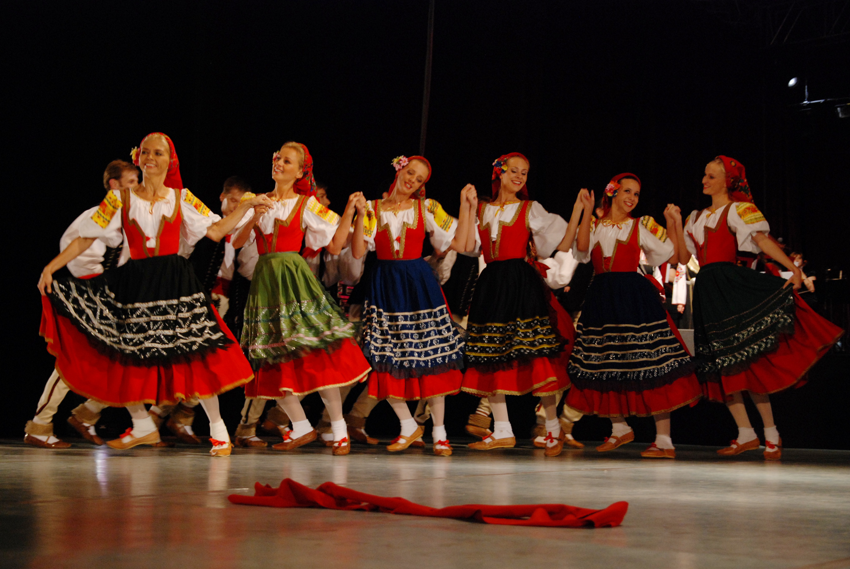 Jubileuszowy koncert Zespołu Pieśni i Tańca "Śląsk" oraz Gorana Bregovića wraz z "Wedding & Funeral Orchestra"